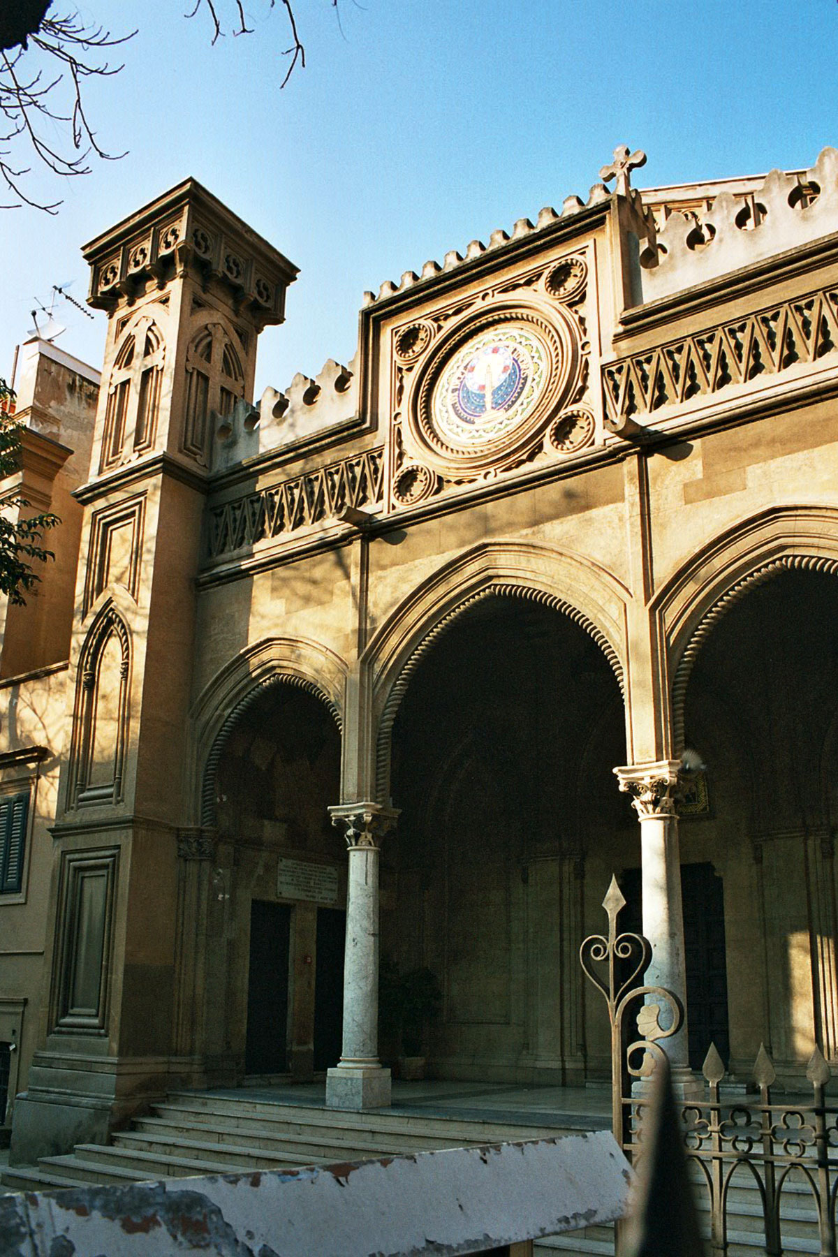 Waldensian Church, Palermo Main Facade